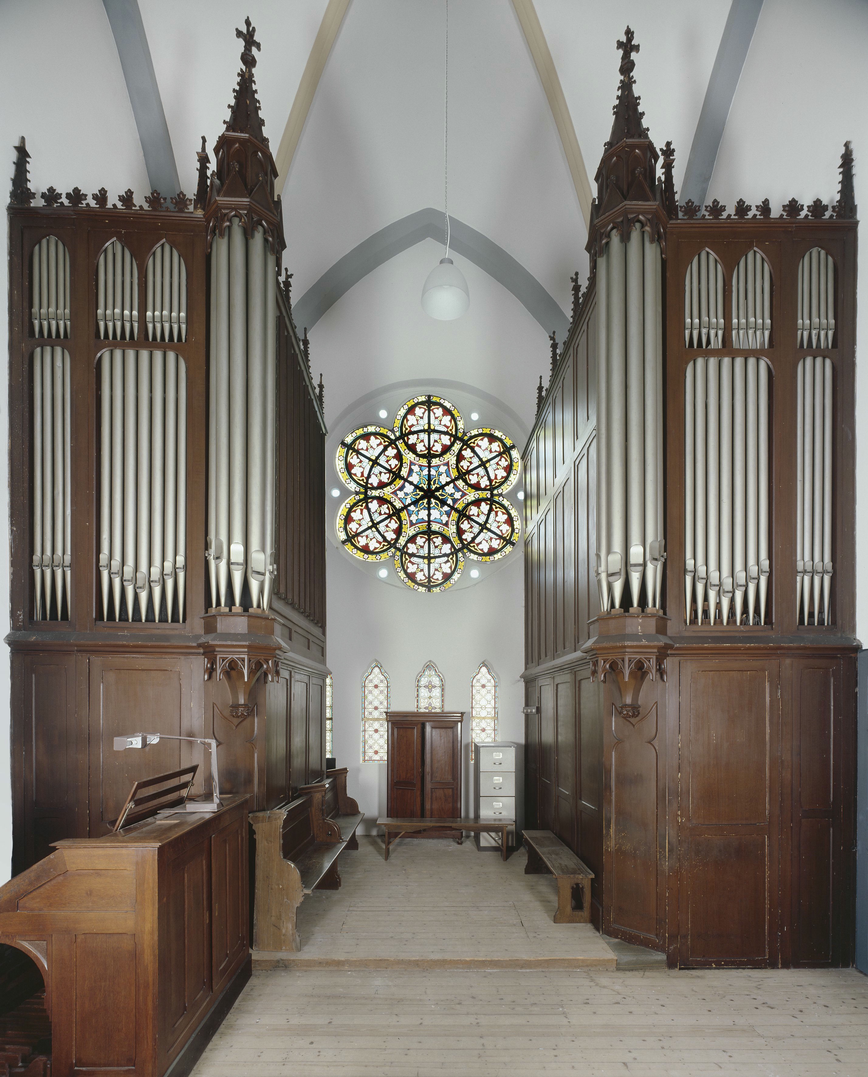 Sint Clemenskerk: Interieur, aanzicht orgel (opmerking: Gefotografeerd voor Het Historische Orgel in Nederland 1878-1886, Bladzijde 226)